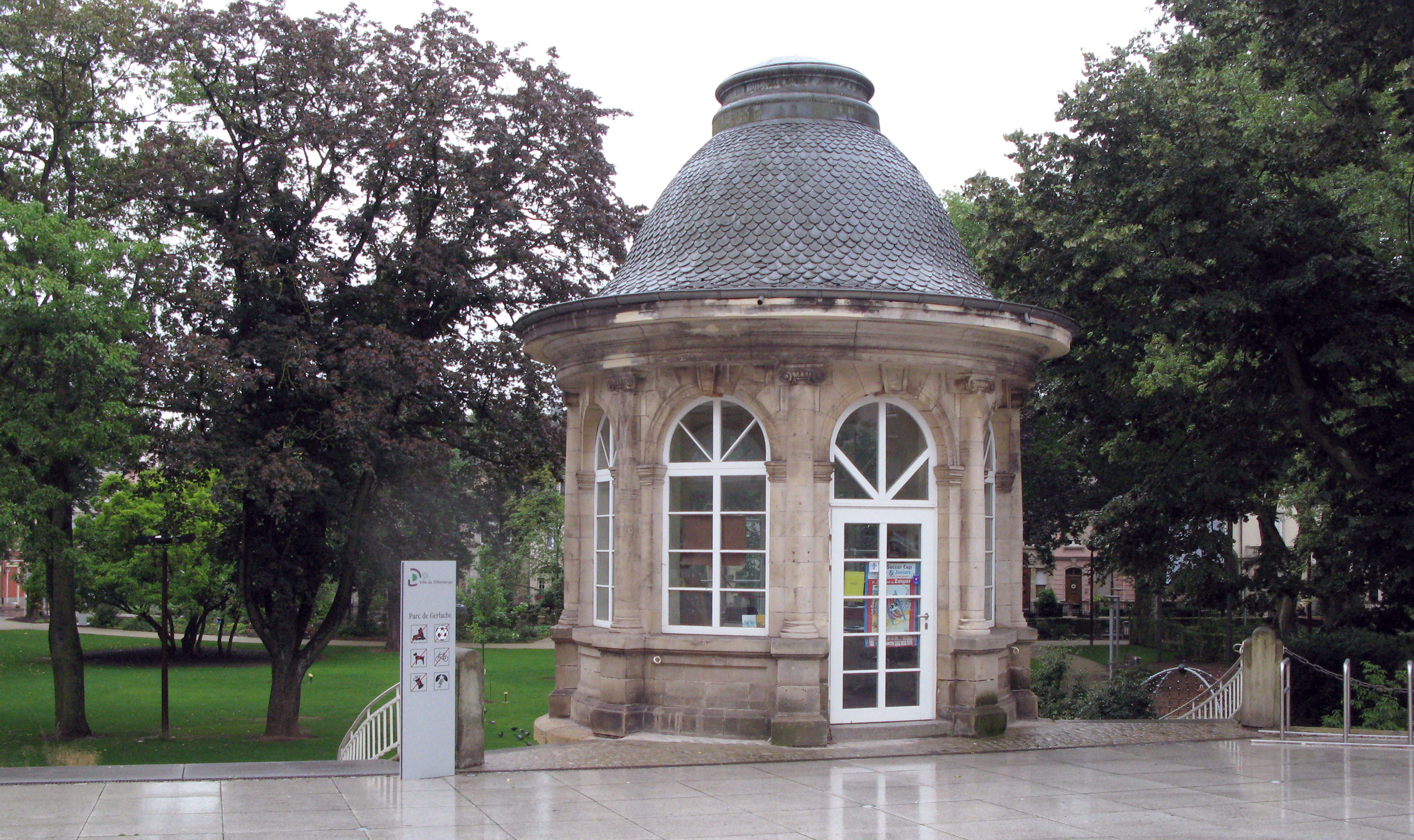 De Pavillon beim Gerlache-Park.